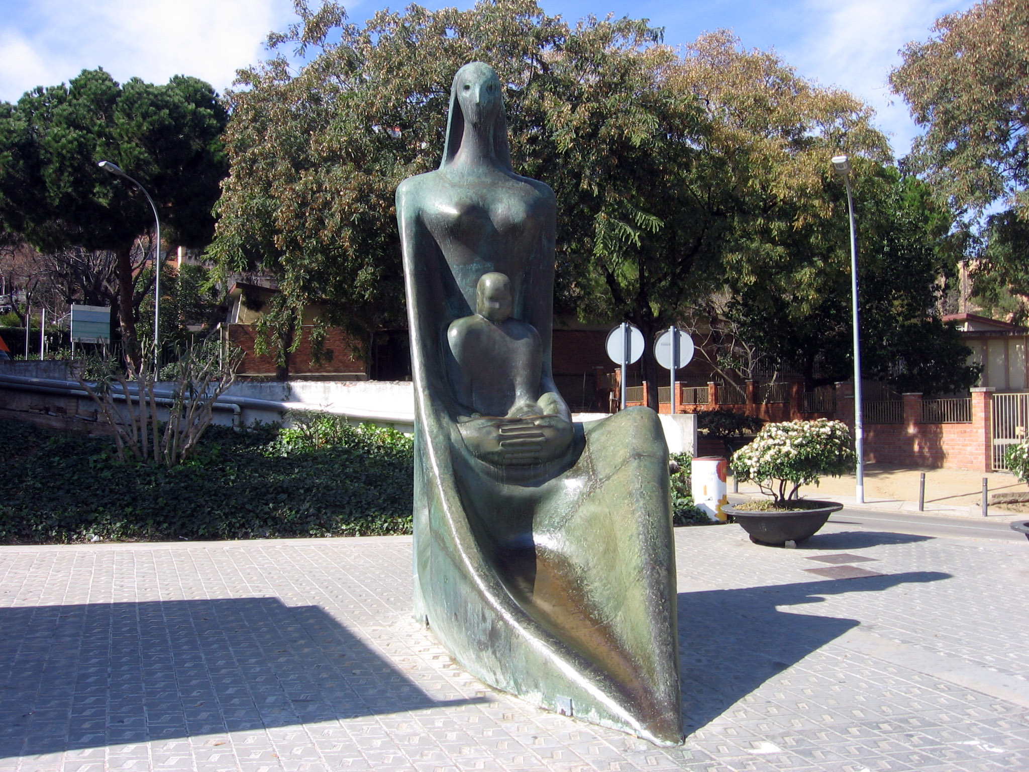 Maternidad, Carlos Ferreira de la Torre, Hospital Vall d'Hebron.